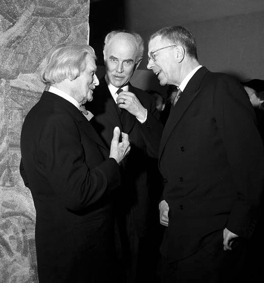 Konstnären Carl Eldh (fr.v.) i samspråk med riksmarskalken Birger Ekeberg och kung Gustaf VI Adolf